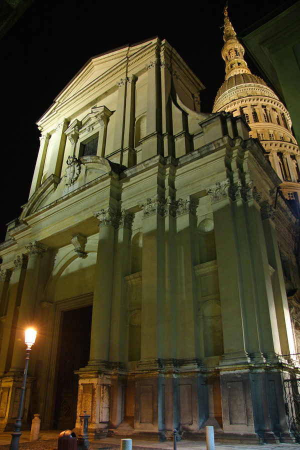 Facciata della Basilica di San Gaudenzio a Novara, notturna